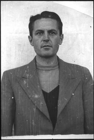 Rudolf Heinrich Suttrop (* 17. Juli 1911; † 28. Mai 1946 im Landsberg am Lech) war SS-Obersturmführer und als Adjutant des Lagerkommandanten in den Konzentrationslagern Groß-Rosen und Dachau eingesetzt. Suttrop wurde im Dachau-hauptprozess zum Tode verurteilt und hingerichtet.